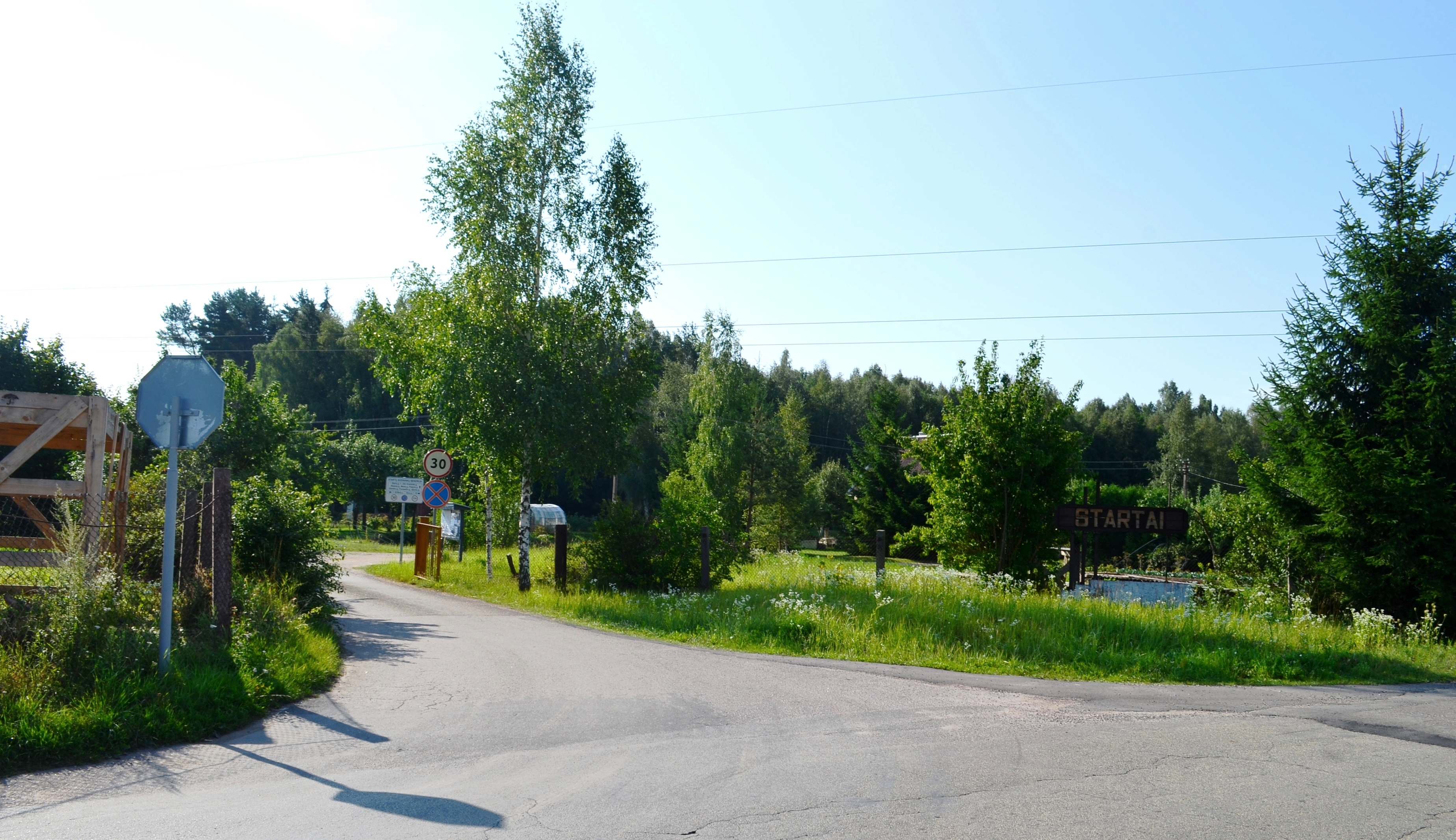 Startai, Panevėžio r.